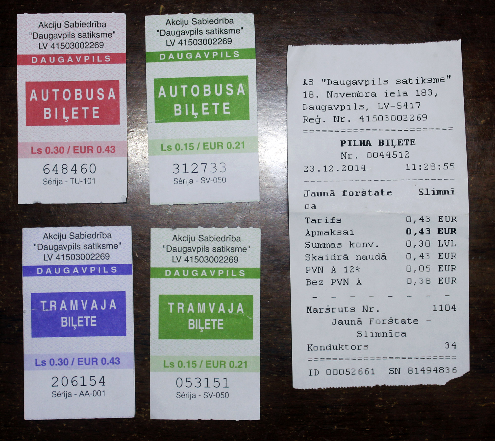 Daugavpils sabiedriska transporta biļetes